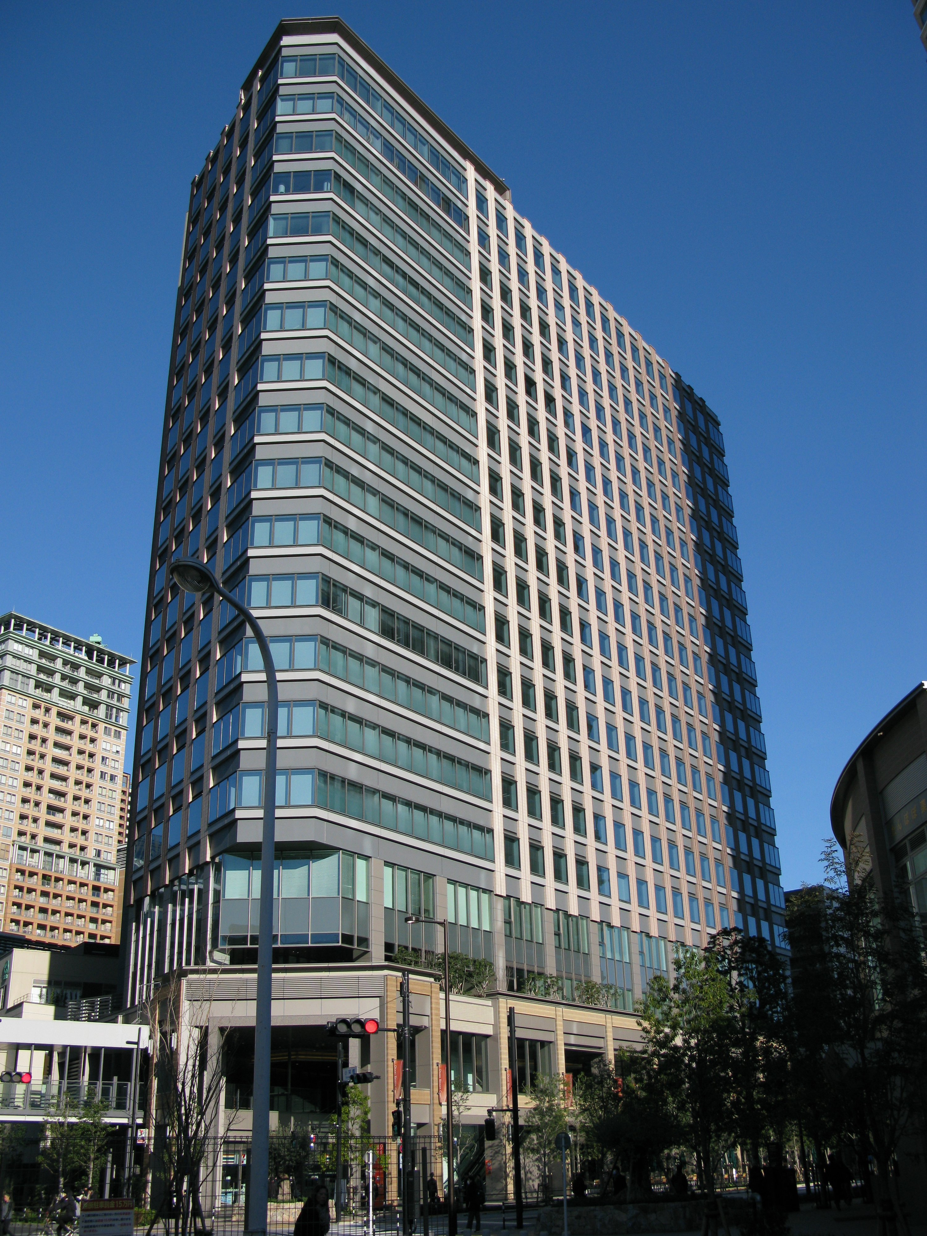 大崎ブライトコア（パークシティ大崎）。品川区北品川5丁目。